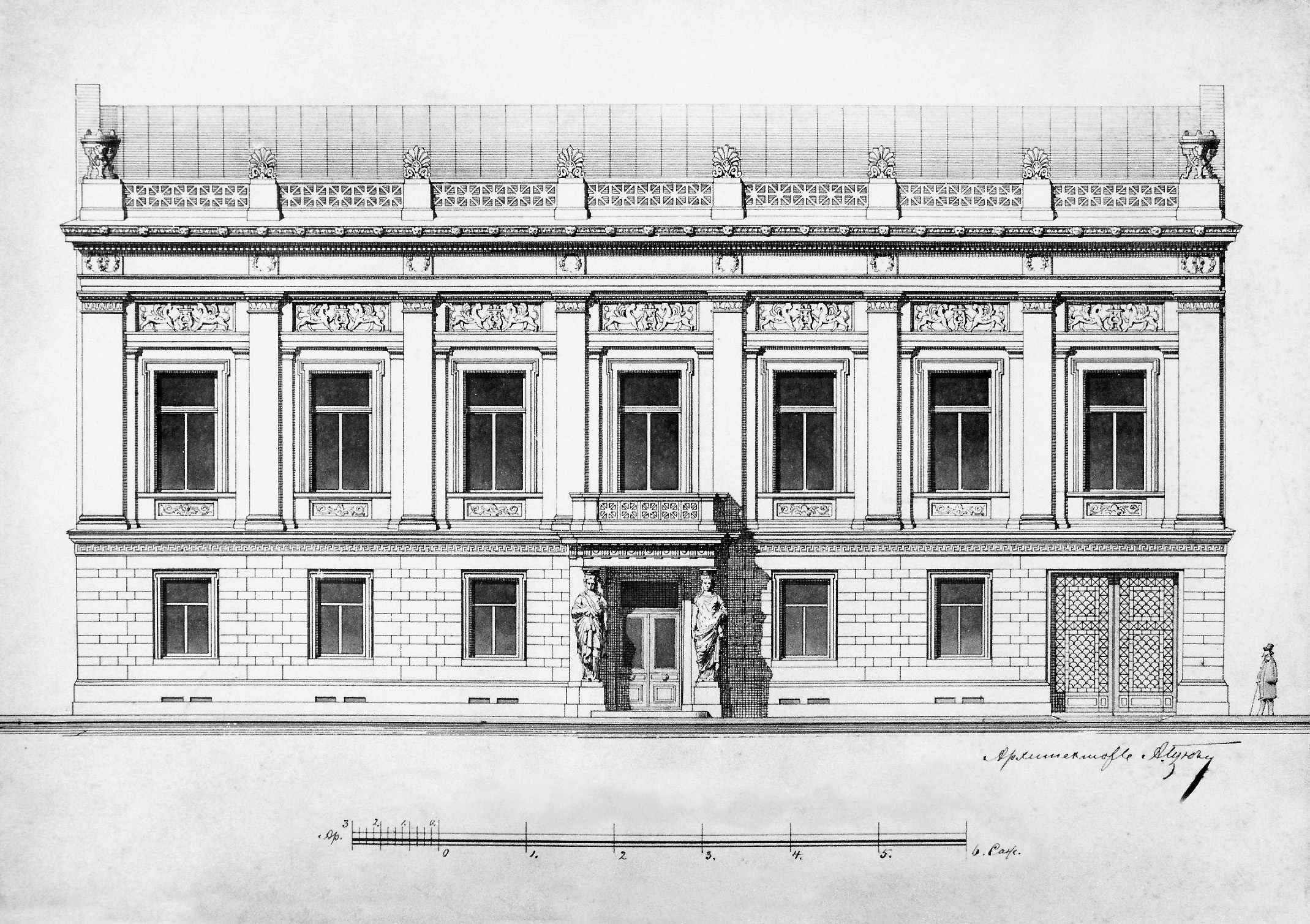 Фасад пристройки к особняку Терещенко (Киев, Терещенковская, 9). Проект А. Л. Гуна